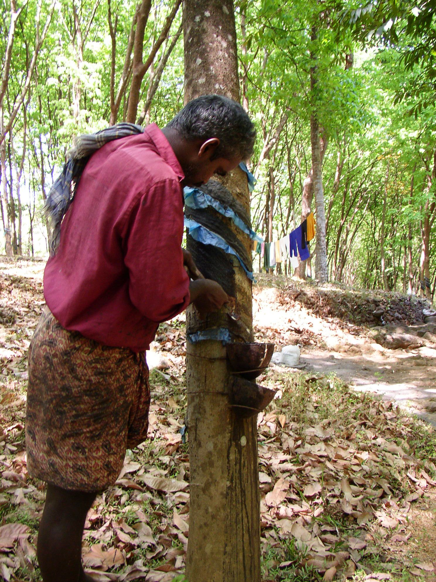 Kautschukplantage in Kerala (Indien)Rainer Haeßner, selbst fotografiert, Februar 2003, GNU-FDL